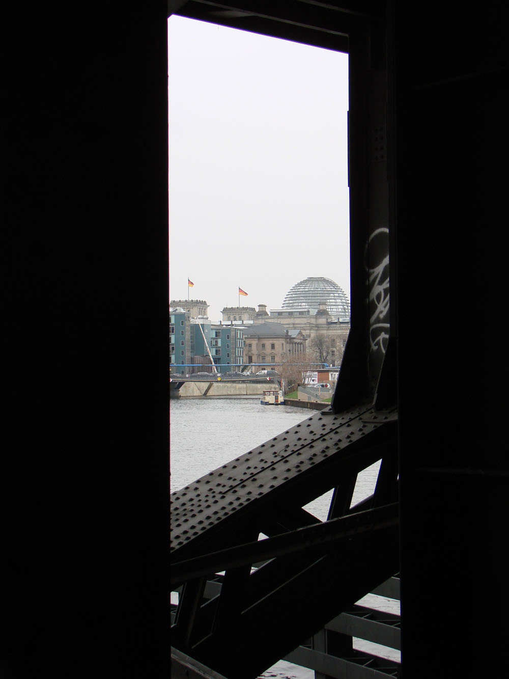 Brücke unter Bahnhof Berlin Friedrichstr. Fotografiert Richtung Reichstag